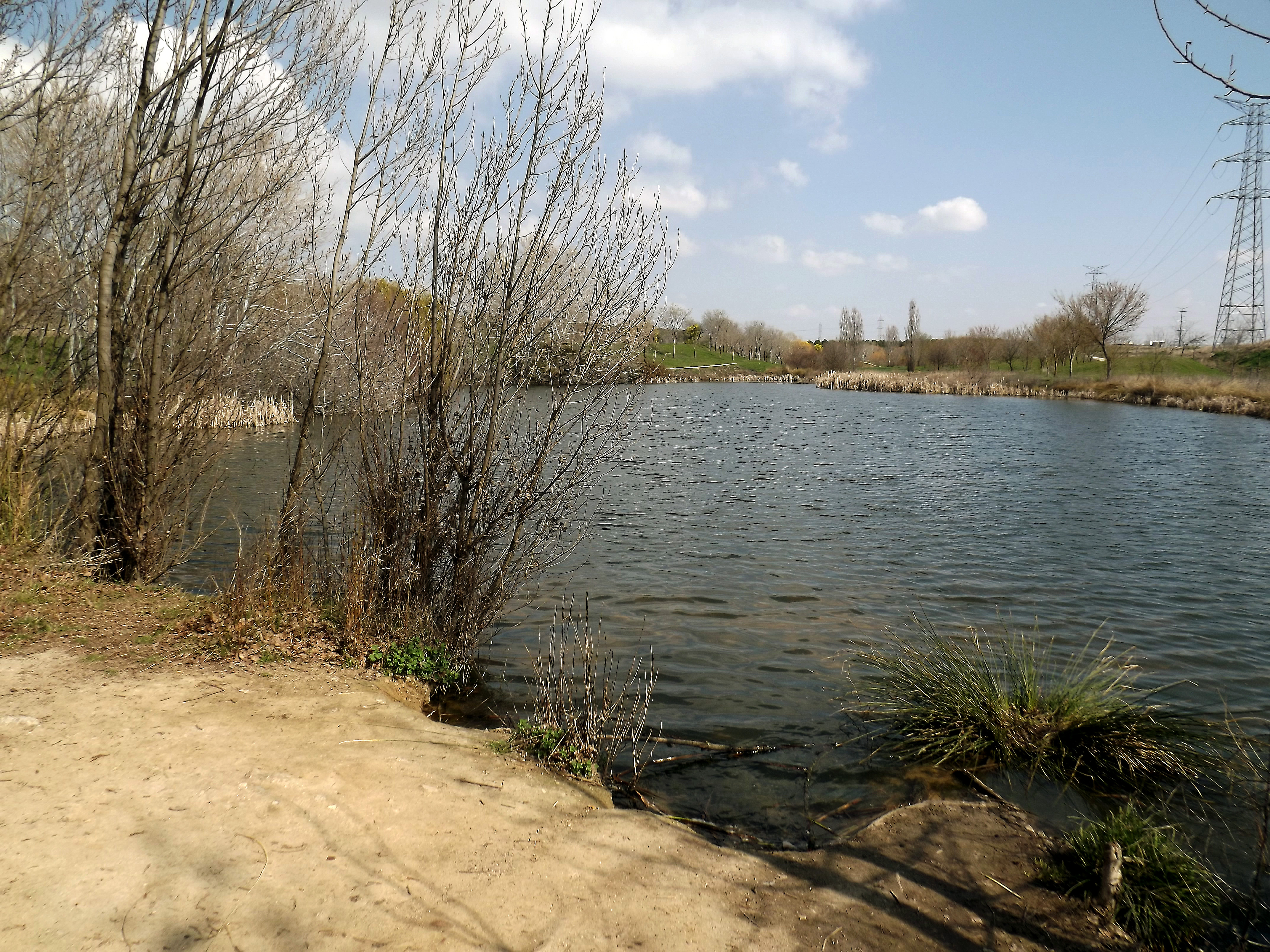 La Laguna de la Recomba cerca de la antigua Polvoranca